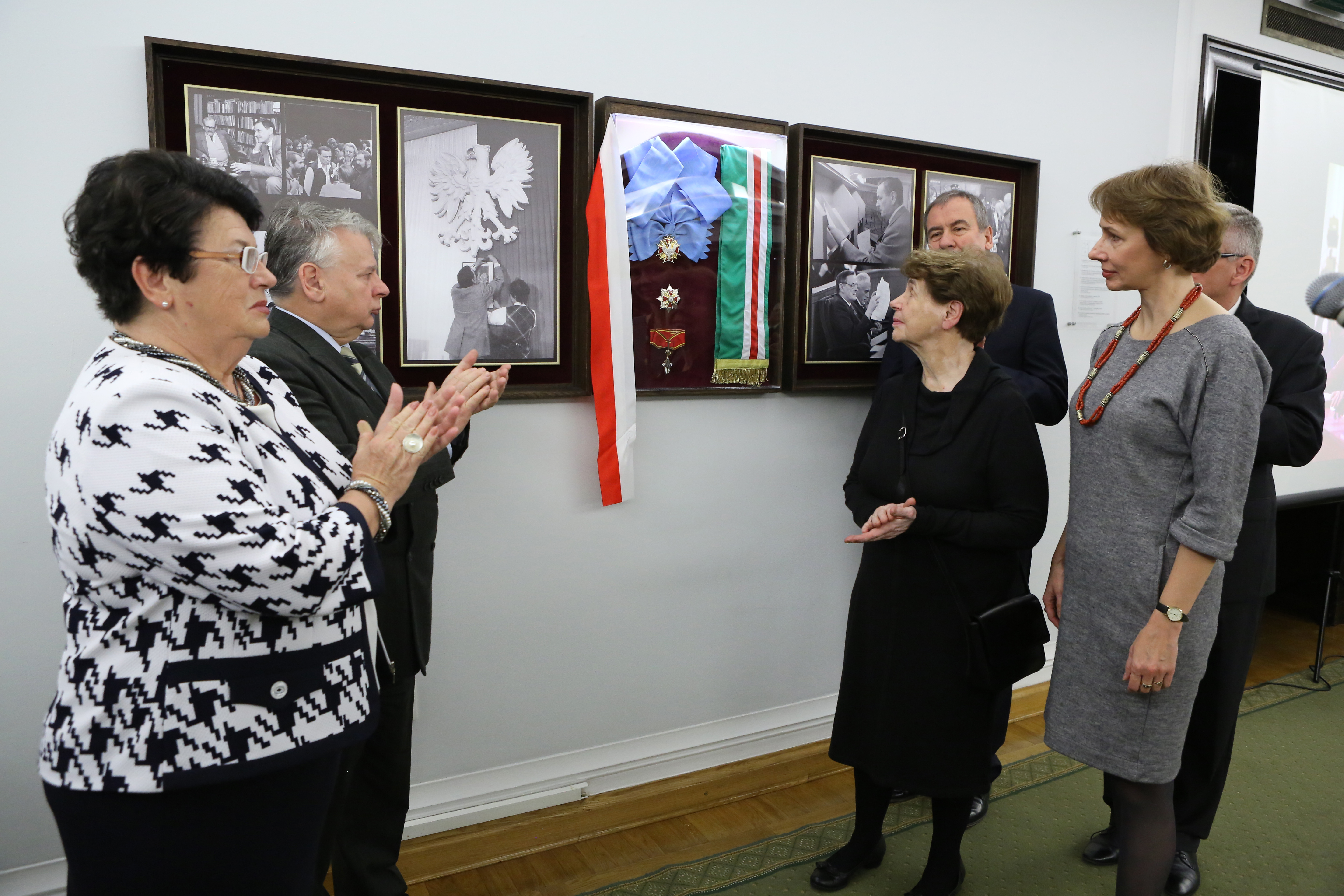 Uroczystość przekazania orderów i archiwum Zbigniewa Romaszewskiego przez Zofię Romaszewską i Agnieszkę Romaszewską-Guzy Archiwum Senatu i Archiwum Akt Nowych